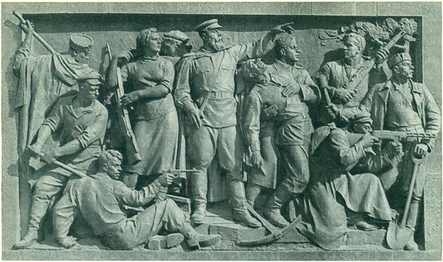 Глебаў. Партызаны Беларусі. 1953. Бронза